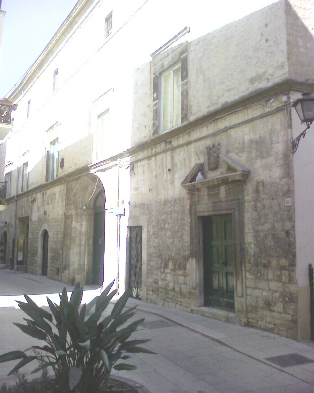 palazzo colavecchio- Modugno (bari)-Italy